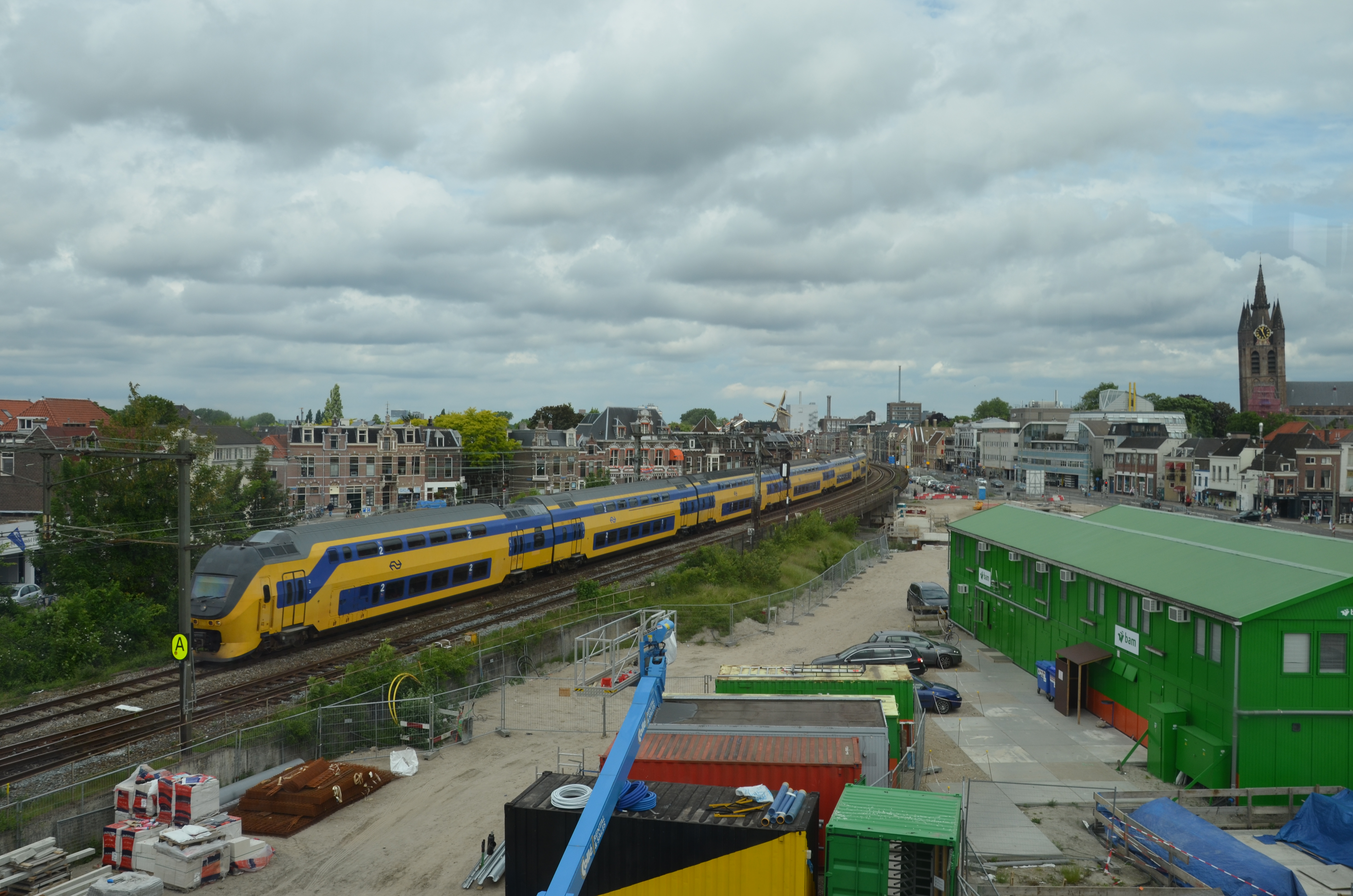 Het Delftse spoorviaduct.